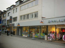 Dort stnad früher das Germania-Kino